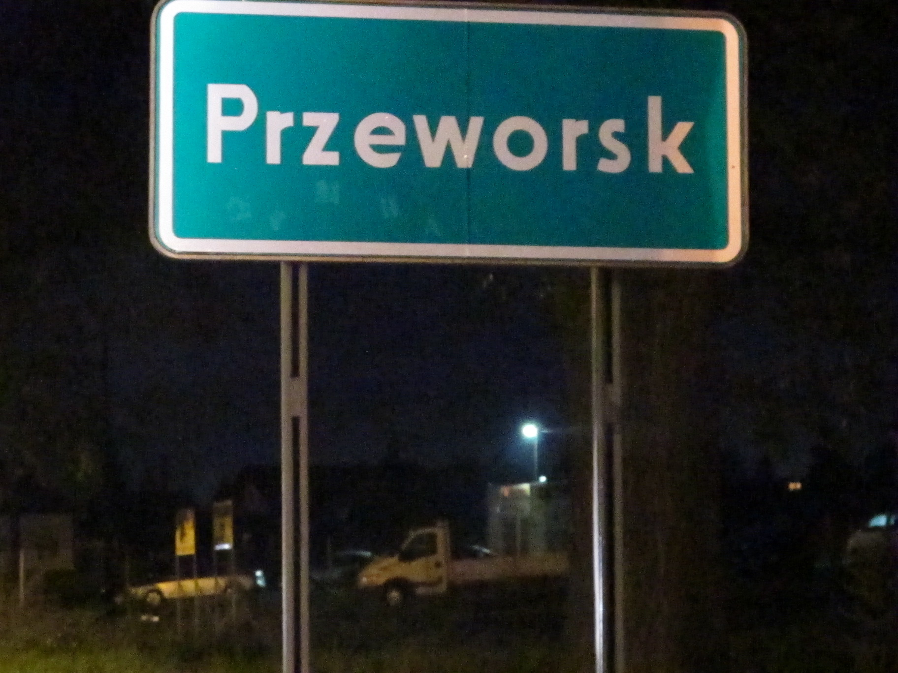 שלט הכניסה לעיירה פשבורסק